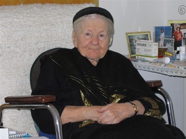 Irena Sendler (1910-2008)